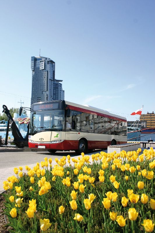 Alpino 8,9 LE